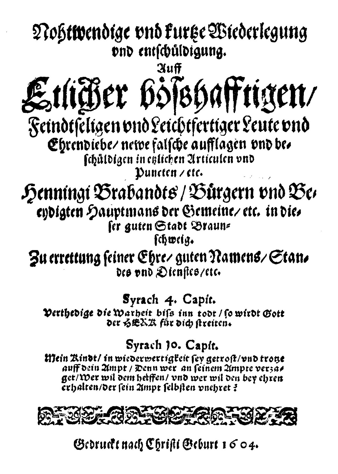 Henning Brabandt: Nohtwendige und kurtze Wiederlegung und entschüldigung. Auff Etlicher bösshafftigen/ Feindtseligen und Leichtfertiger Leute und Ehrendiebe/ newe falsche aufflagen und beschüldigen in etzlichen Articulen und Puncten. 1604, Titelseite